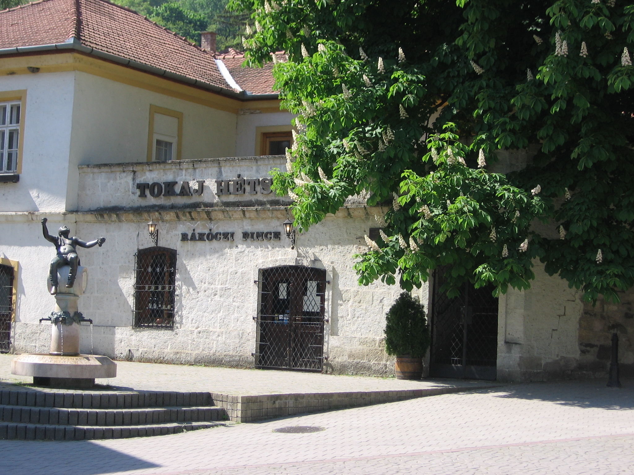 Rakoczi wine cellar (Rakoczi pince) in Tokaj town Piwnice winne "Rakoczi pince" w Tokaju